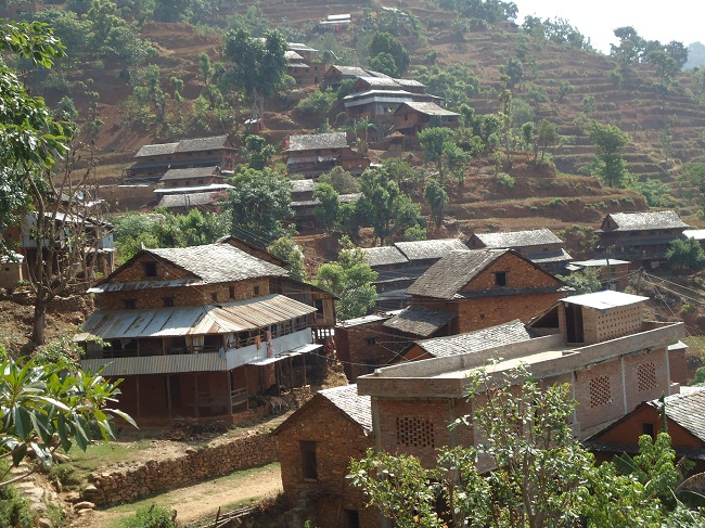 नेपाली: Duipipal nuwakot nepal majha gau